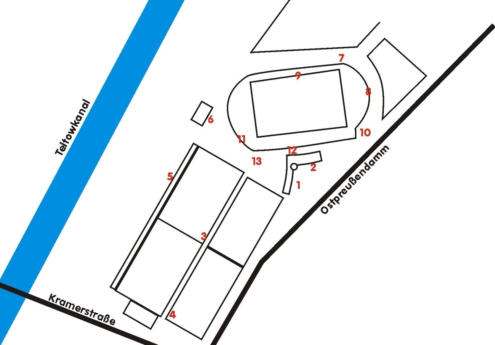 Schematische Zeichnung des Stadion Lichterfelde mit den Aufnahmepositionen der weiteren Bilder